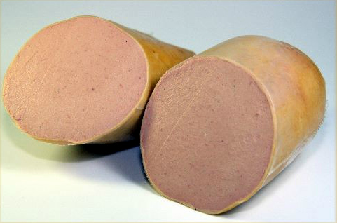 In England käuflich zu erwerben durch Direktimport aus Deutschland